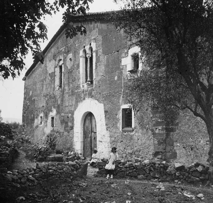 Façana d'una masia de Gelida. Josep Salvany i Blanch (1914)